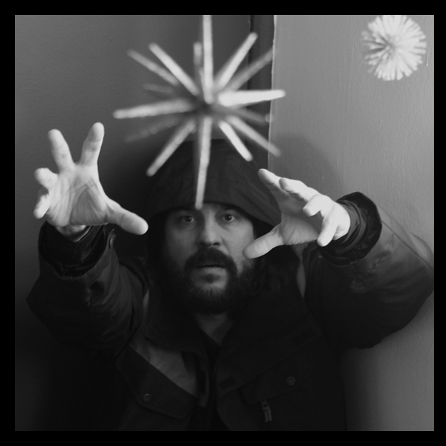 GABRIEL O PENSADOR em Hollywood Califórnia, em março de 2019 / Foto de Ithaka Darin Pappas